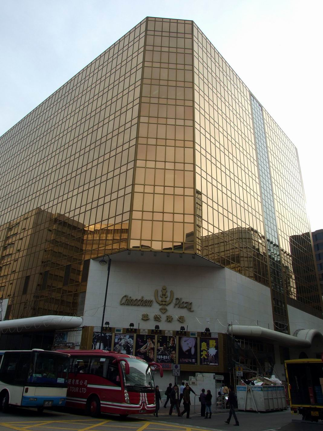 華懋廣場